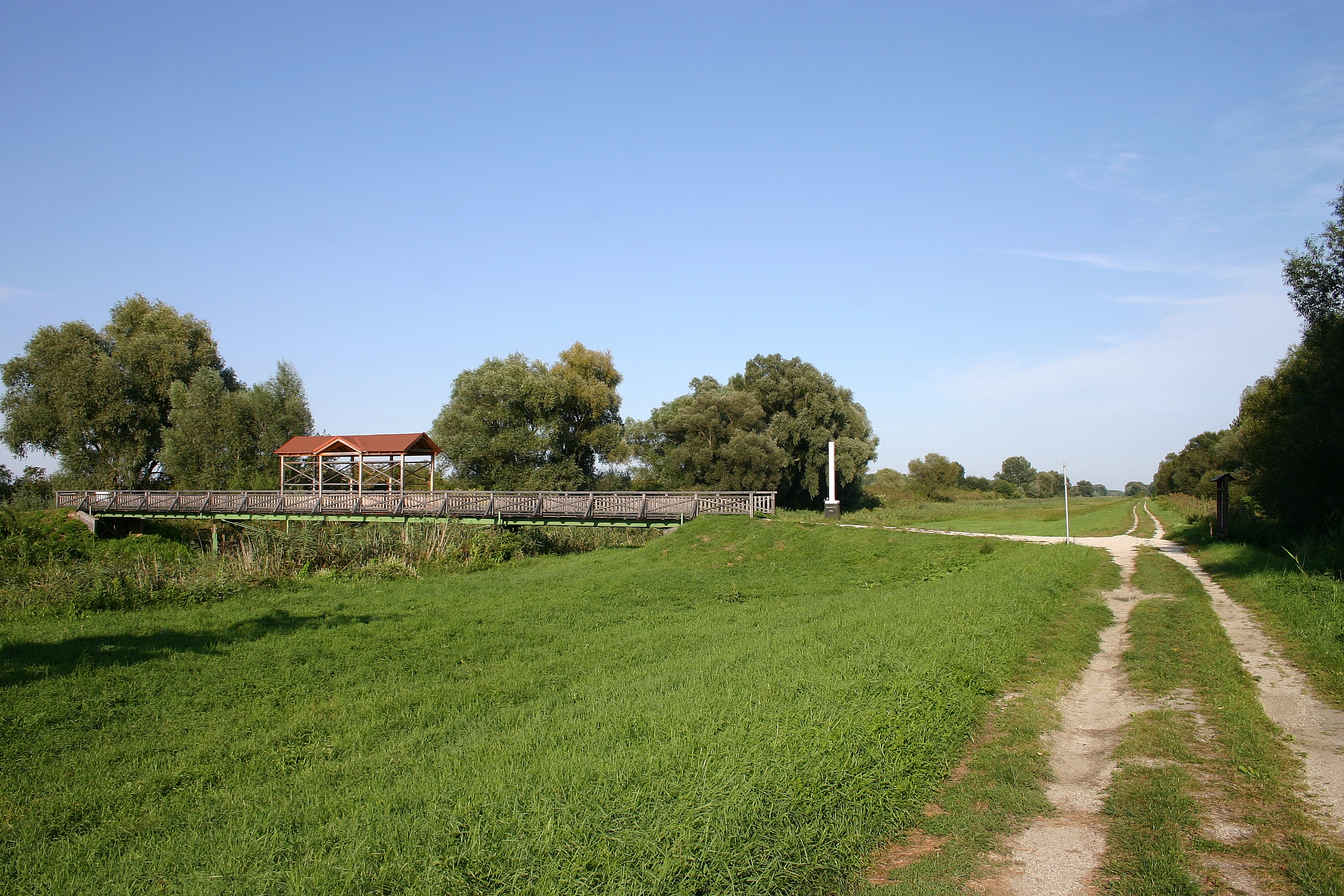 Andau – Grenzstreifen bei der Brücke von Andau mit dem Einser-Kanal, Originalschauplatz für den Film Der Bockerer III